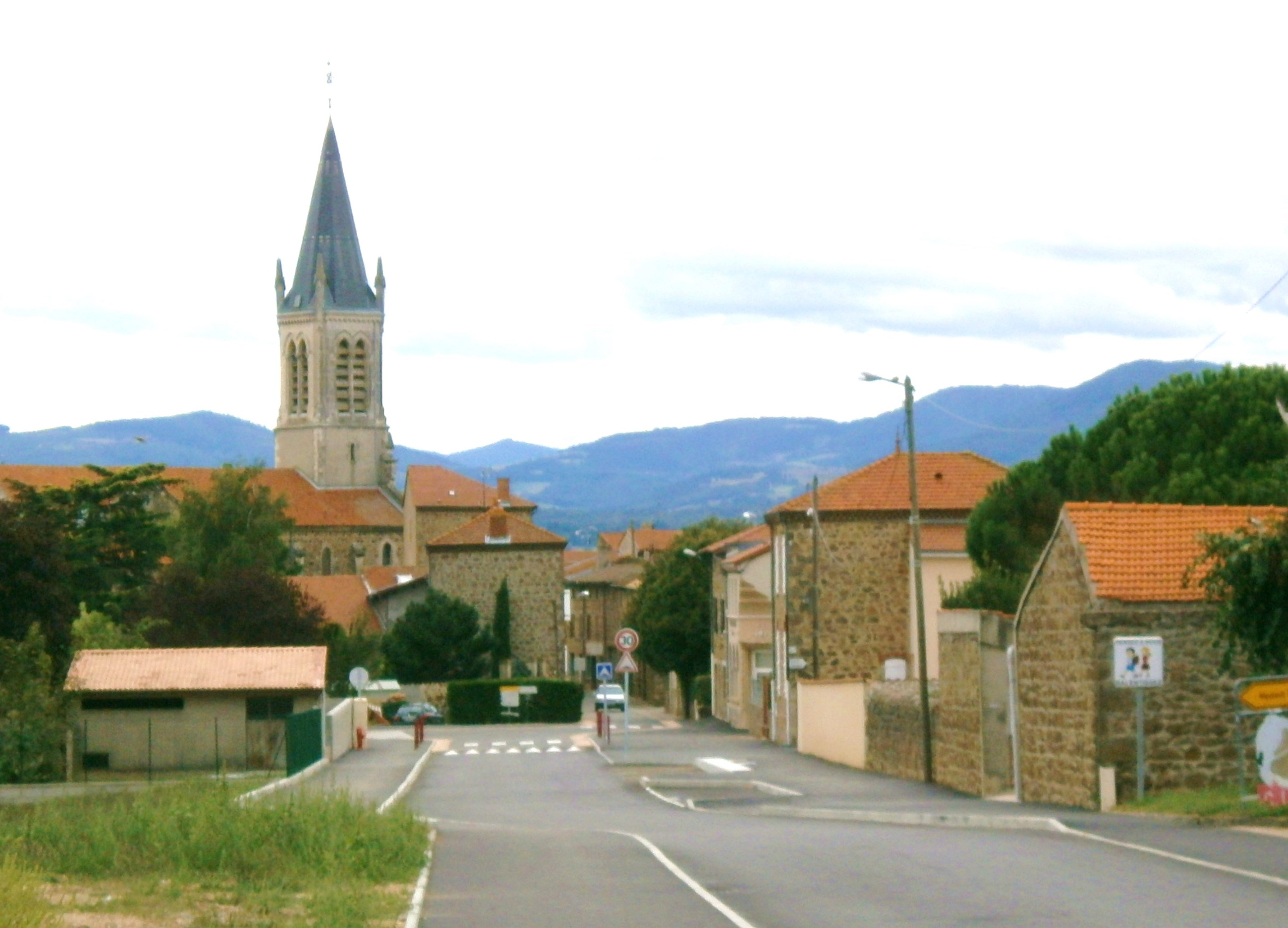 Vernosc-lès-Annonay, entrée du village